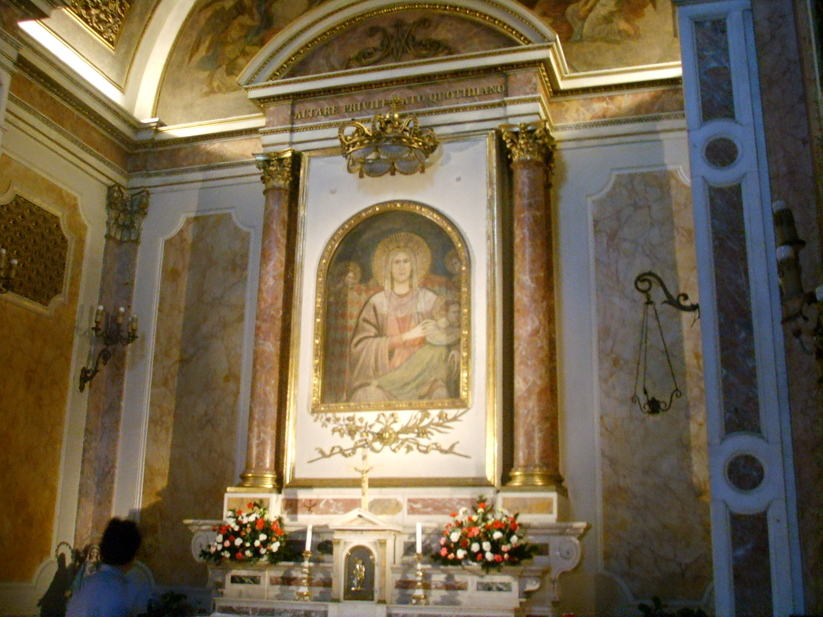 Oratorio_madonna_delle_grazie_inside